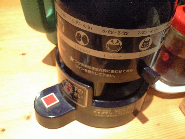 占い機